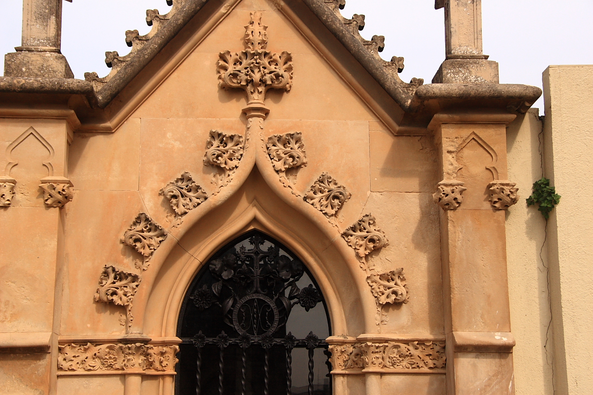 Vista general hipogeus de segona(Lloret de Mar-La Selva-Catalunya), dins del cementiri modernista de Lloret de Mar (1901)